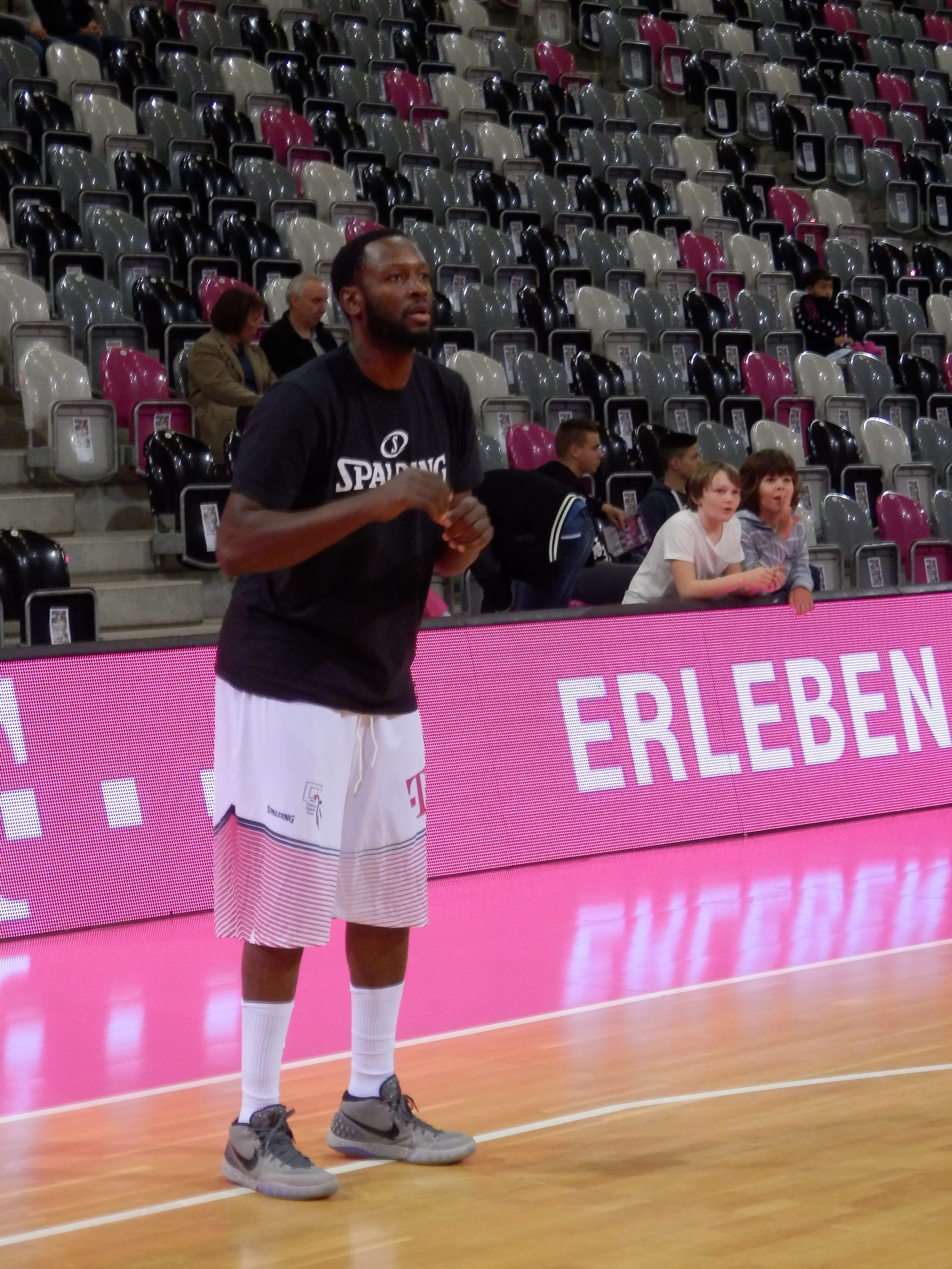 Jimmy McKinney beim Spiel Telekom Baskets Bonn gegen s.Oliver Baskets Würzburg am 01.11.2015.